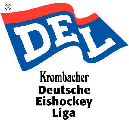 Logo der Deutschen Eishockey-Liga (1994–1995)